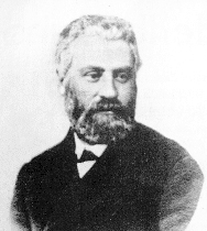 French zoologist and paleontologist Eugène Eudes-Deslongchamps (1830–1889)